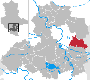 Kabelsketal in Saxony-Anhalt - Saalekreis